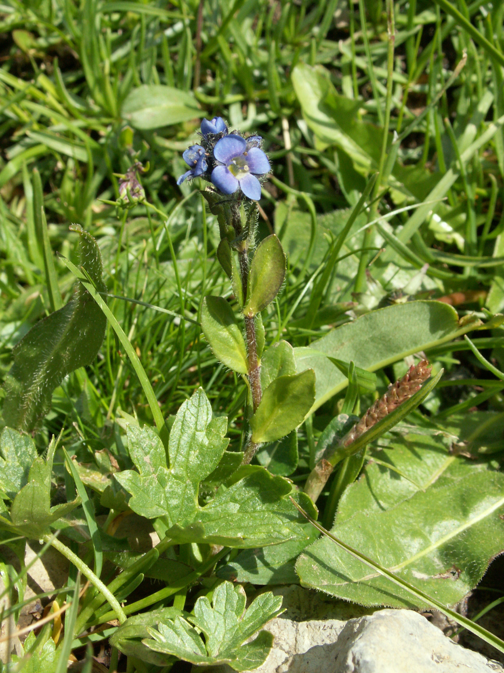 Veronica alpina, Schynige Platte, Kanton Bern, Schweiz